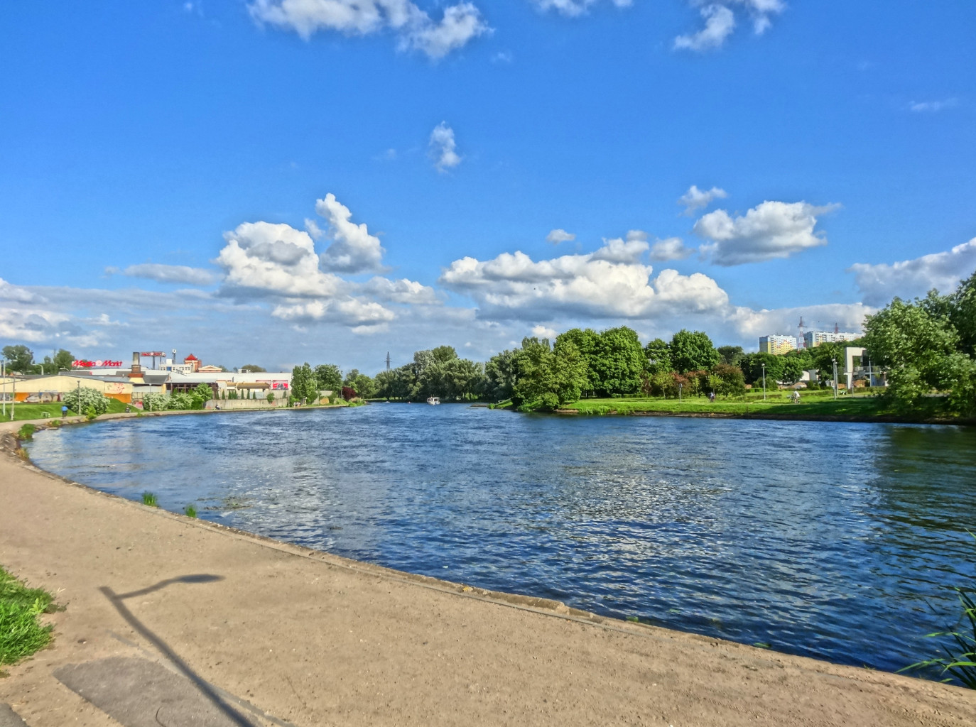 Zakole Brdy w Bydgoszczy koło hali widowiskowo-sportowej "Łuczniczka"